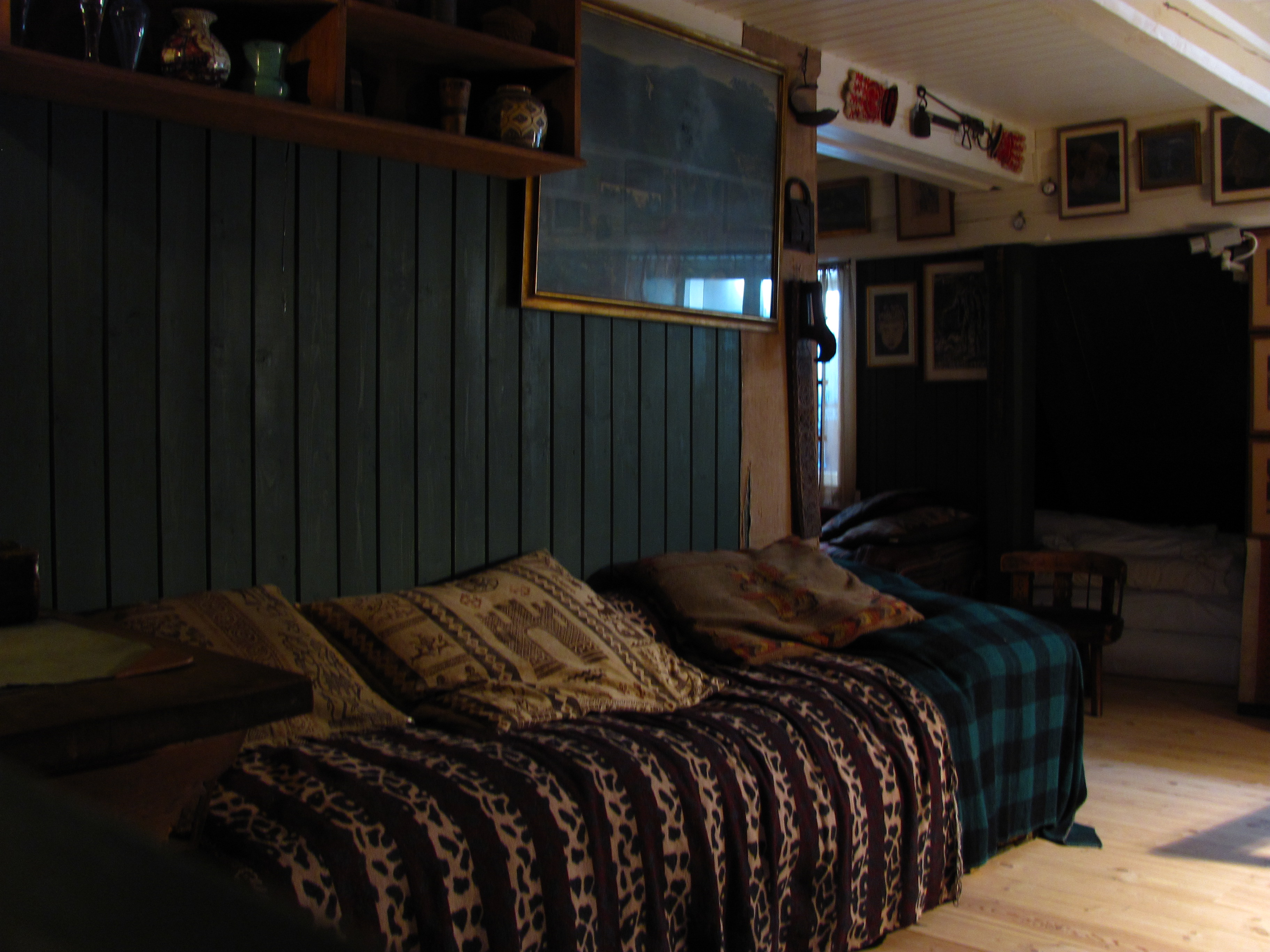 Setesdalsmuseet, Hans Henrik Holms diktarstove